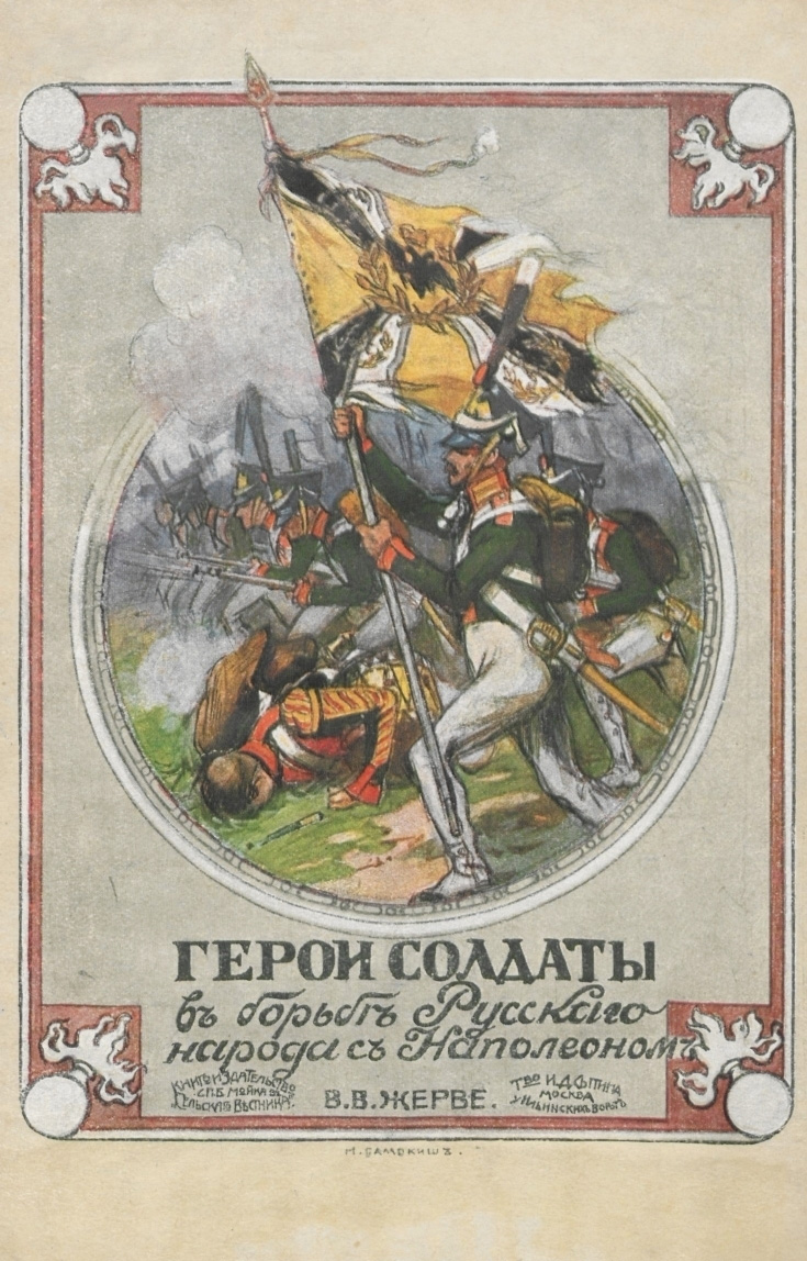 Титульный лист книги В. В. Жерве «Герои солдаты в борьбе русского народа с Наполеоном».